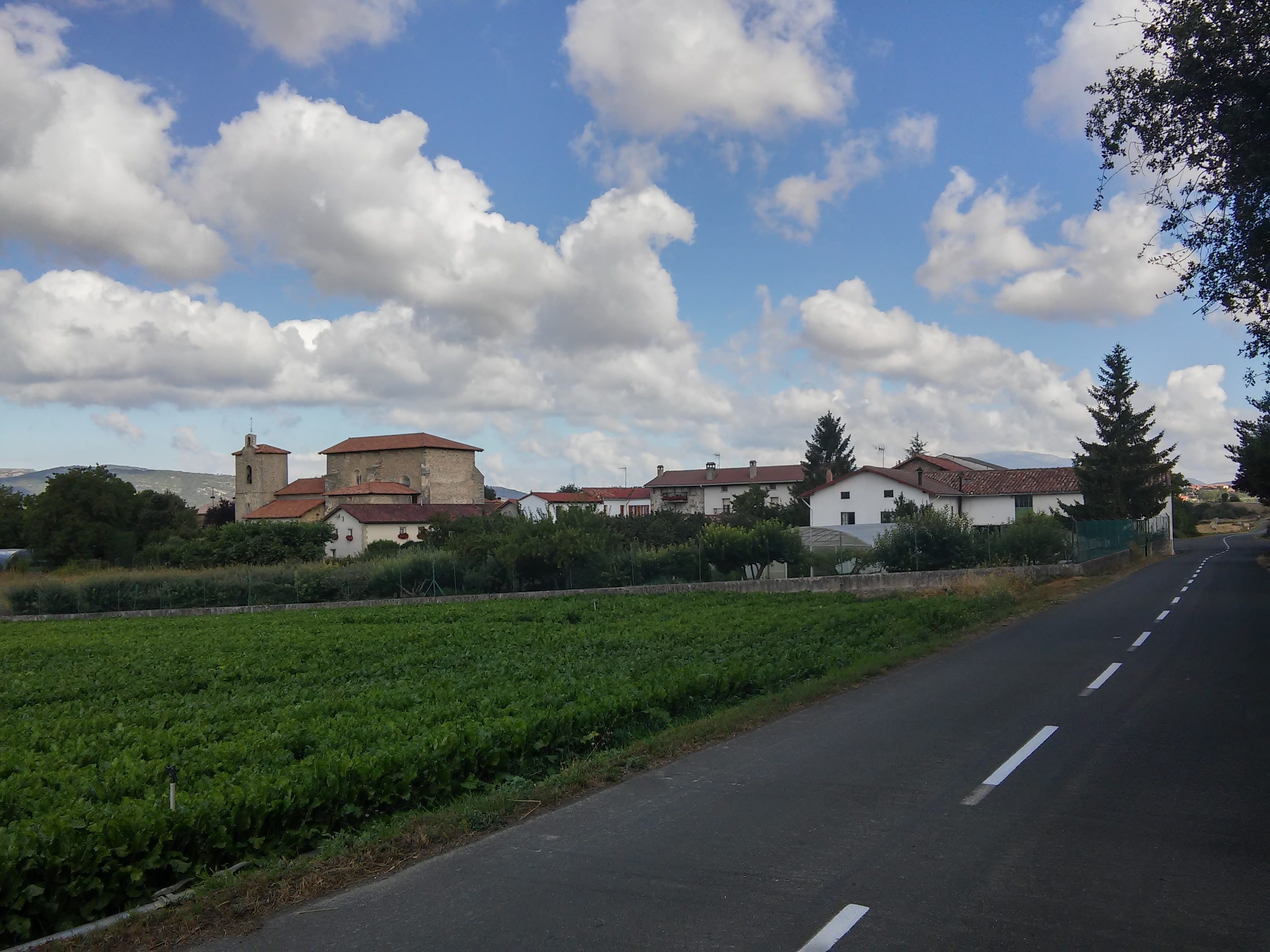 Mendiguren herria (Gasteiz, Araba)